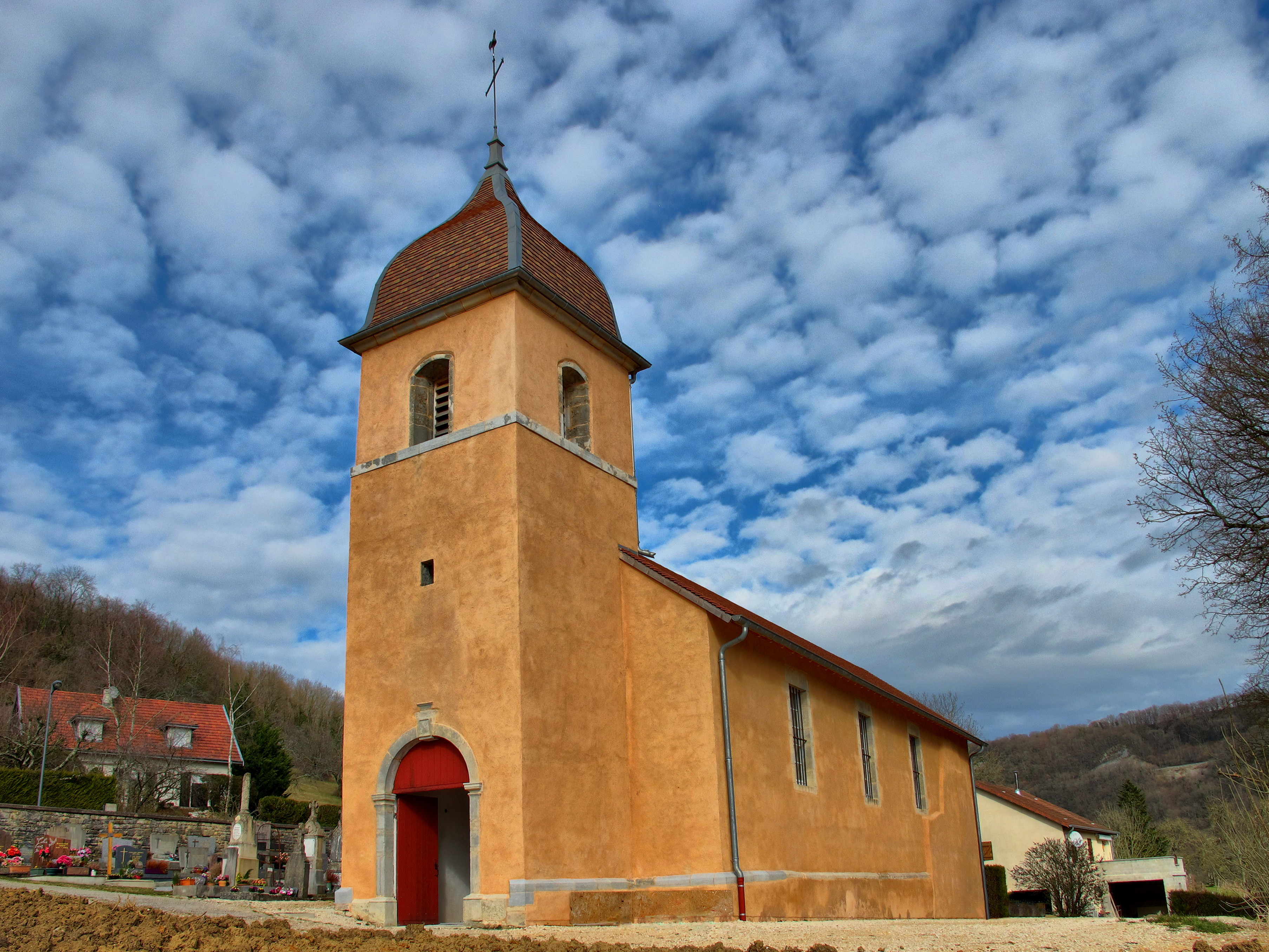 Église Notre-Dame de l'Assomption des Champs (Inscrit) .